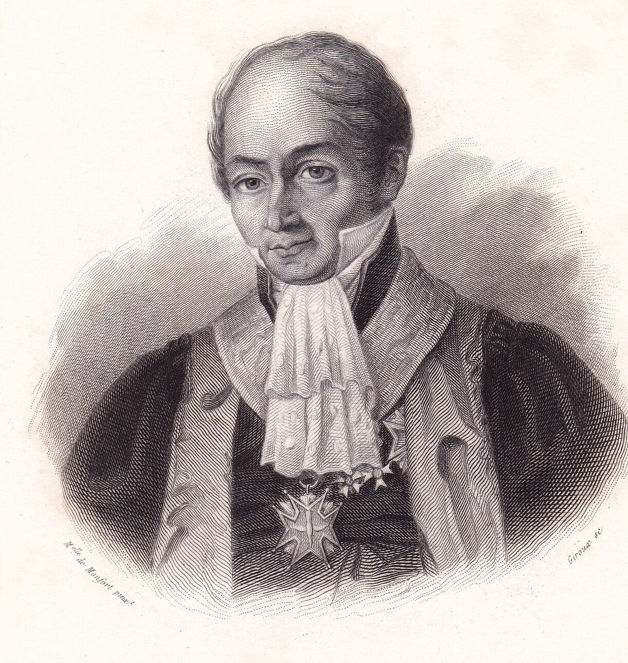 Le comte de Serre. Gravure de Girouac, publiée par Pagnerre, d'après un portrait peint ou dessiné par Mademoiselle de Monfort. Extrait du Livre des Orateurs de Louis Marie de la Haye, vicomte de Cormenin, 1842.